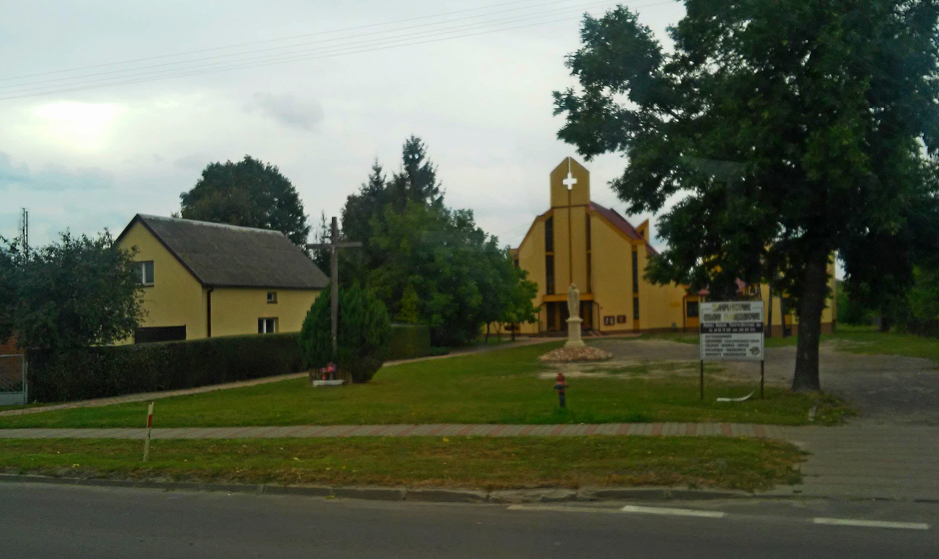 Białopole. Plac w centrum miejscowości i parafialny kościół